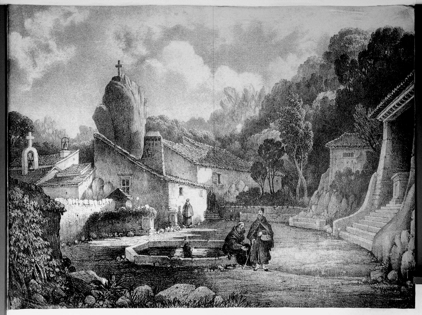 Convento dos Capuchos